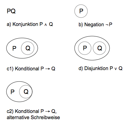 Notation der Alphagraphen, eines logischen Systems von Charles S. Peirce. Selbst gezeichnet.